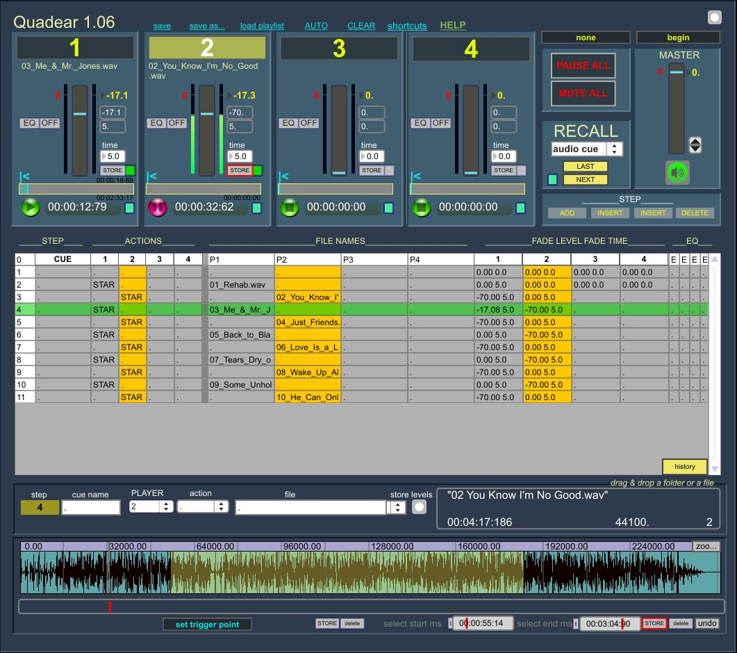 interace de Quadear